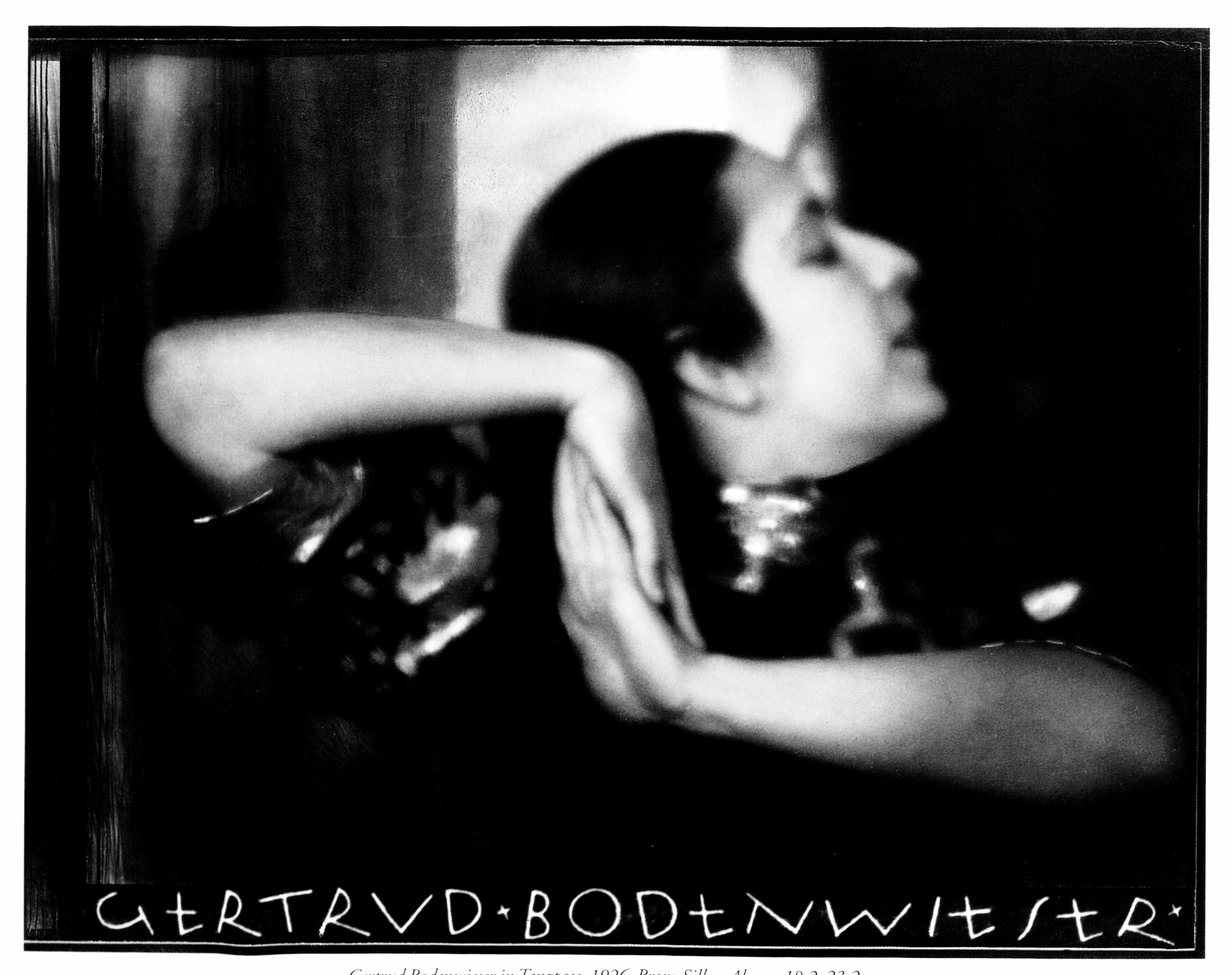 Anton Josef Trčka Gertrud Bodenwieser 1926